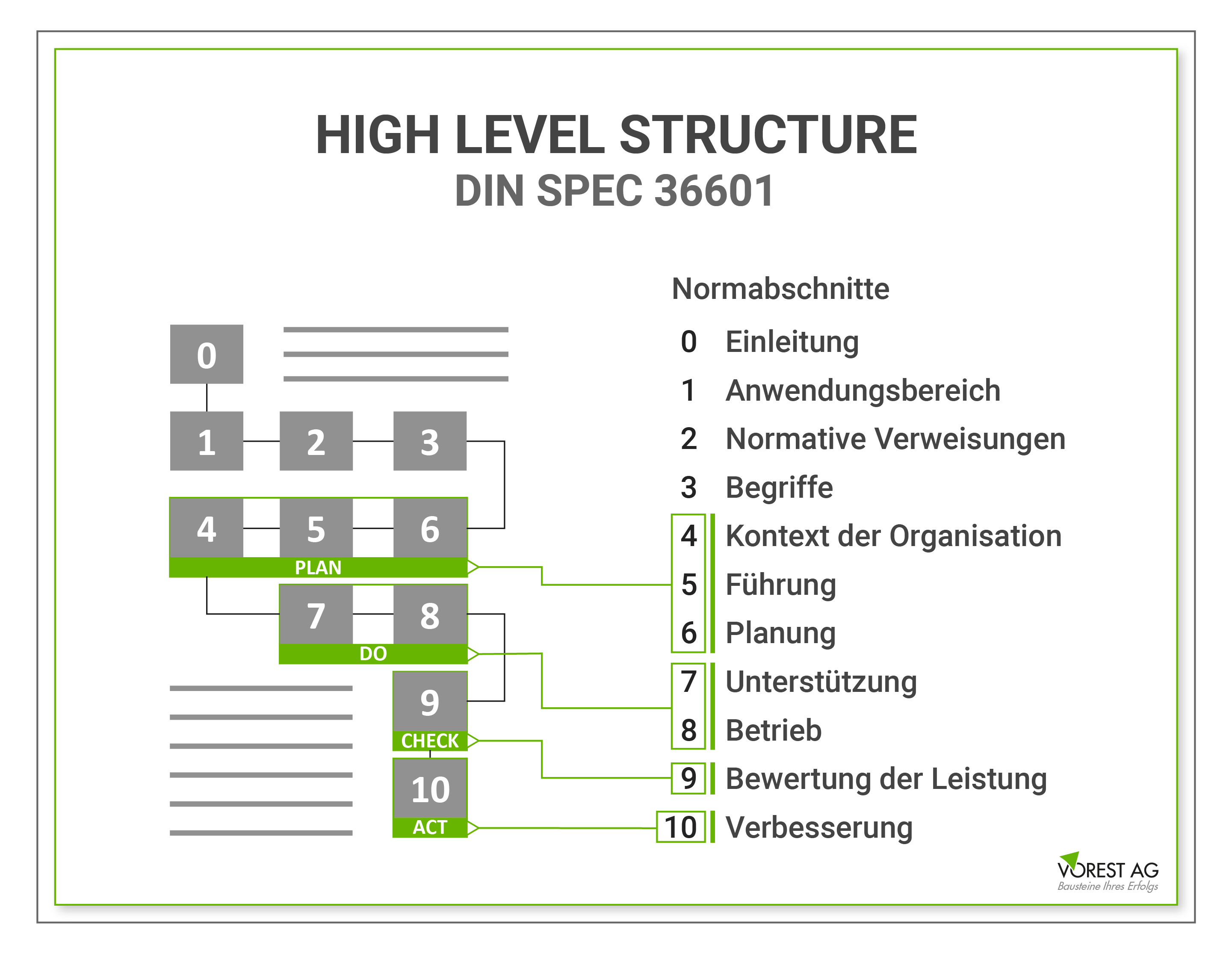 Die High Level Structure und die Phasen des PDCA-Zyklus